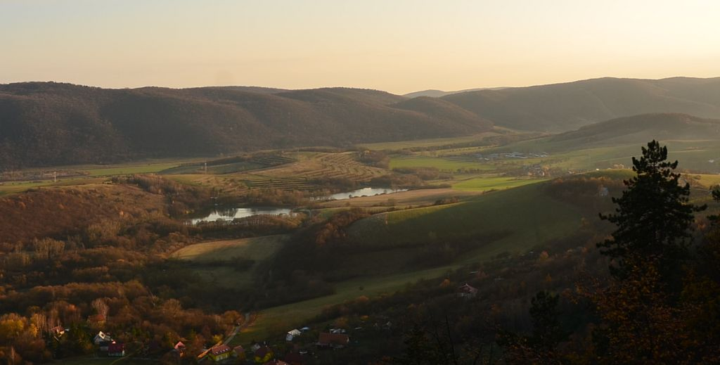 Planinový reliéf na wettersteinskom vápenci v podmienkach Slovenského krasu. Vľavo v pozadí masív západnej časti planiny Dolný vrch (lagunárna fácia wettersteinského vápenca), vpravo JV časť masívu Silickej planiny (rífová fácia wettersteinského vápenca). V popredí zvlnený reléf na spodnotriasových súvrstviach (Turnianska kotlina a Silické úbočie).